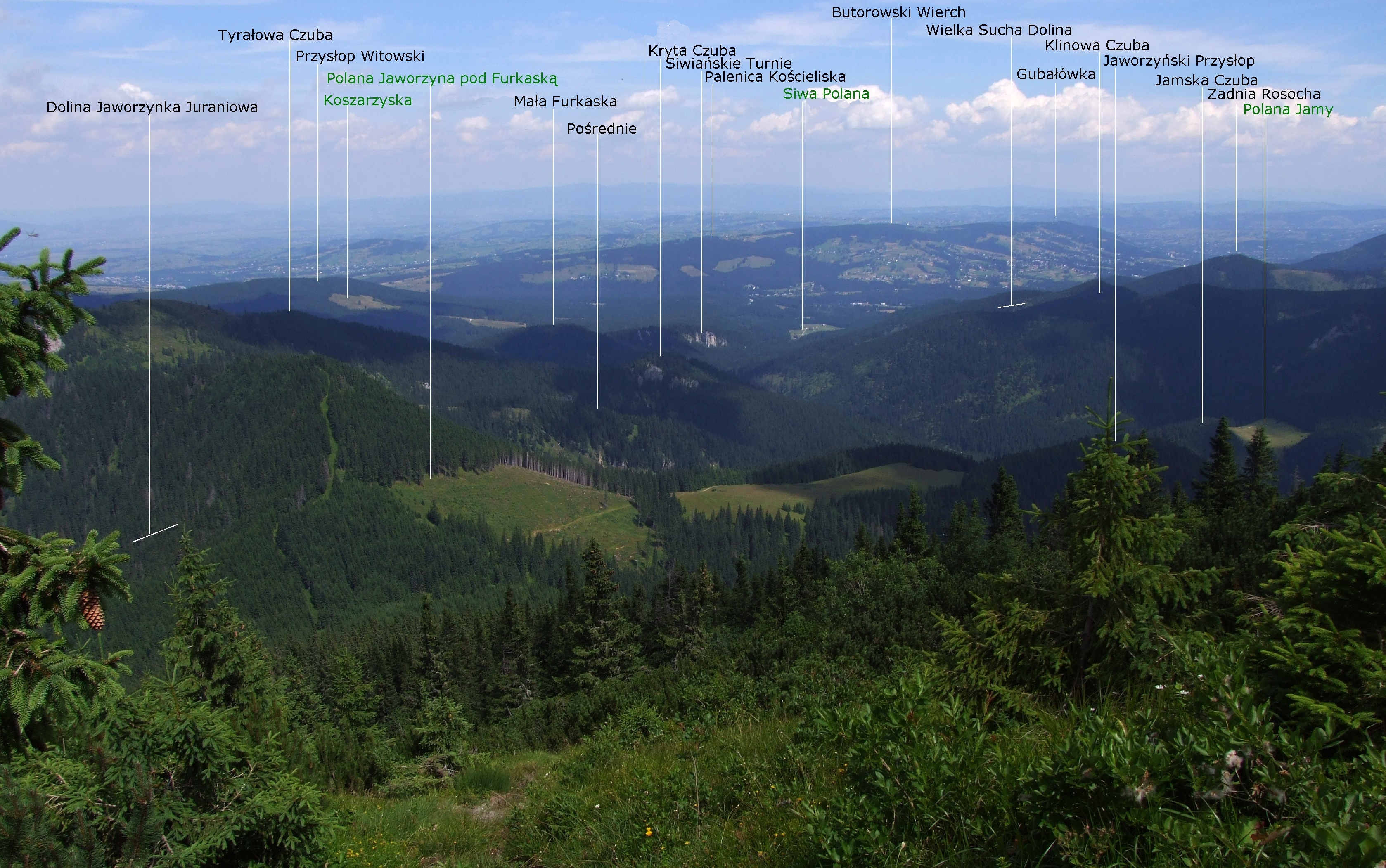 Widok z Bobrowca